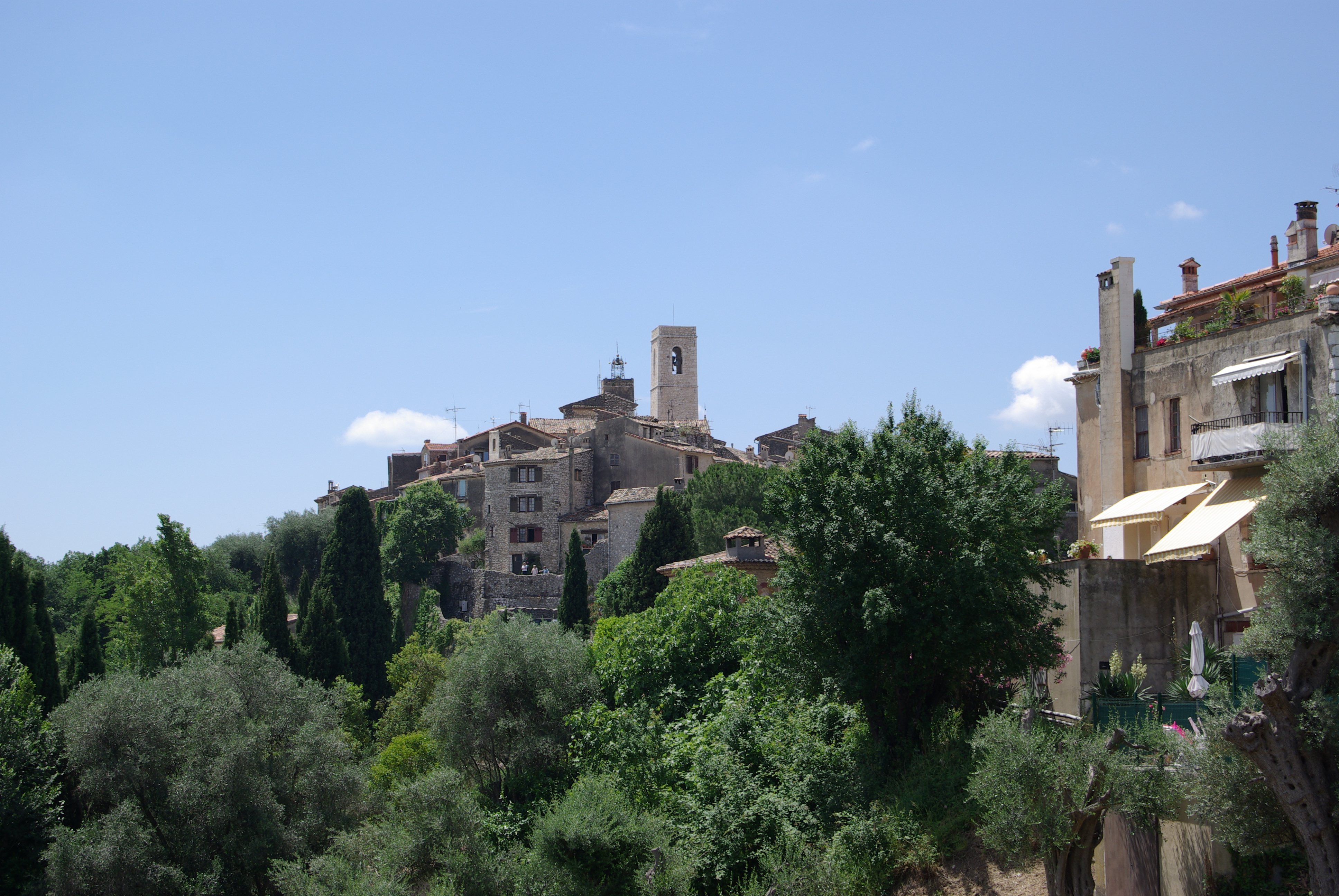 Saint-Paul-de-Vence